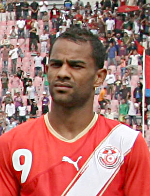 Saber Khelifa, joueur tunisien de football